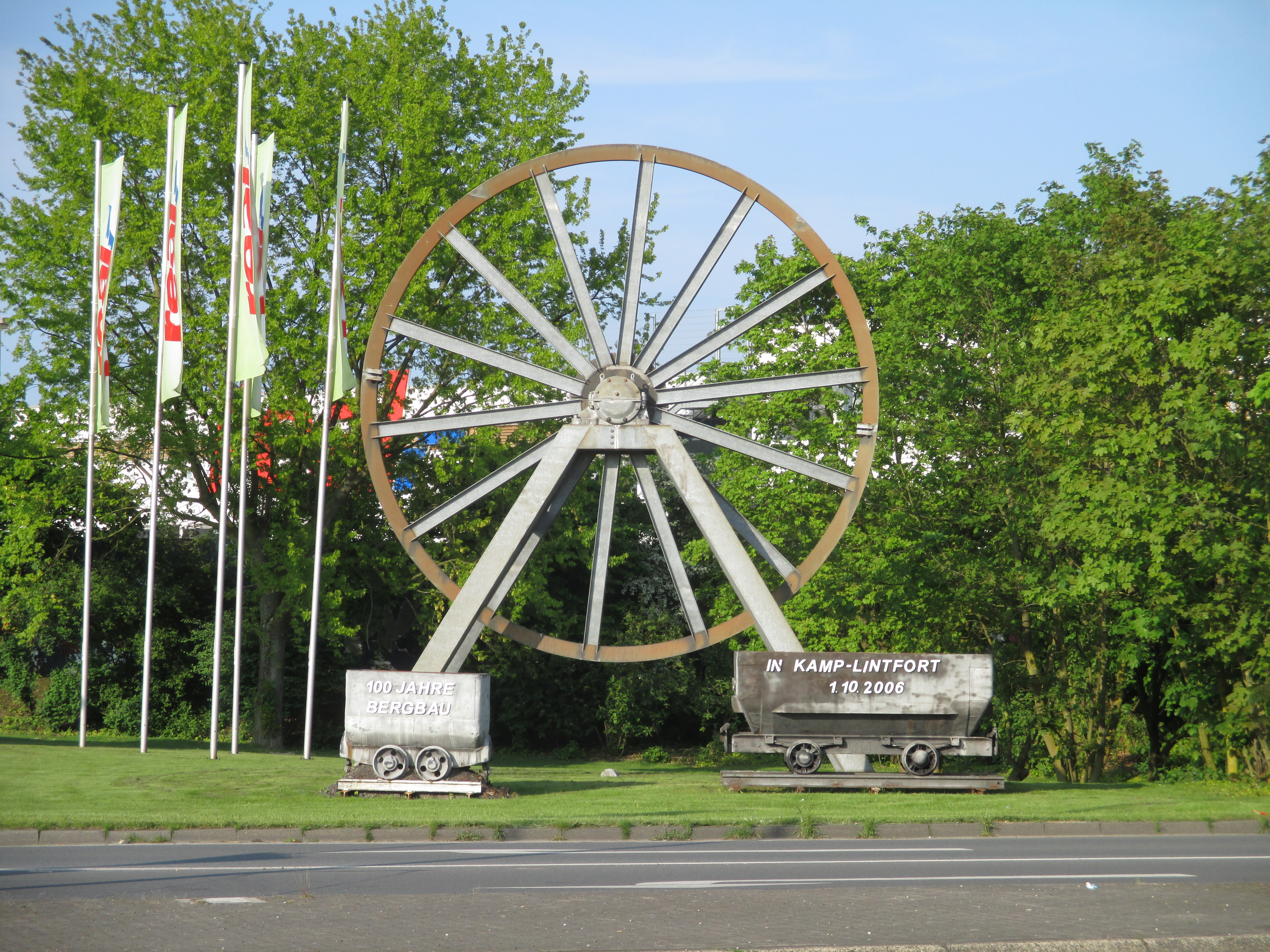 Die Seilwinde erinnert an 100 Jahre Bergbau in Kamp-Lintfort. Sie stammt aus der Zeche Friedrich Heinrich